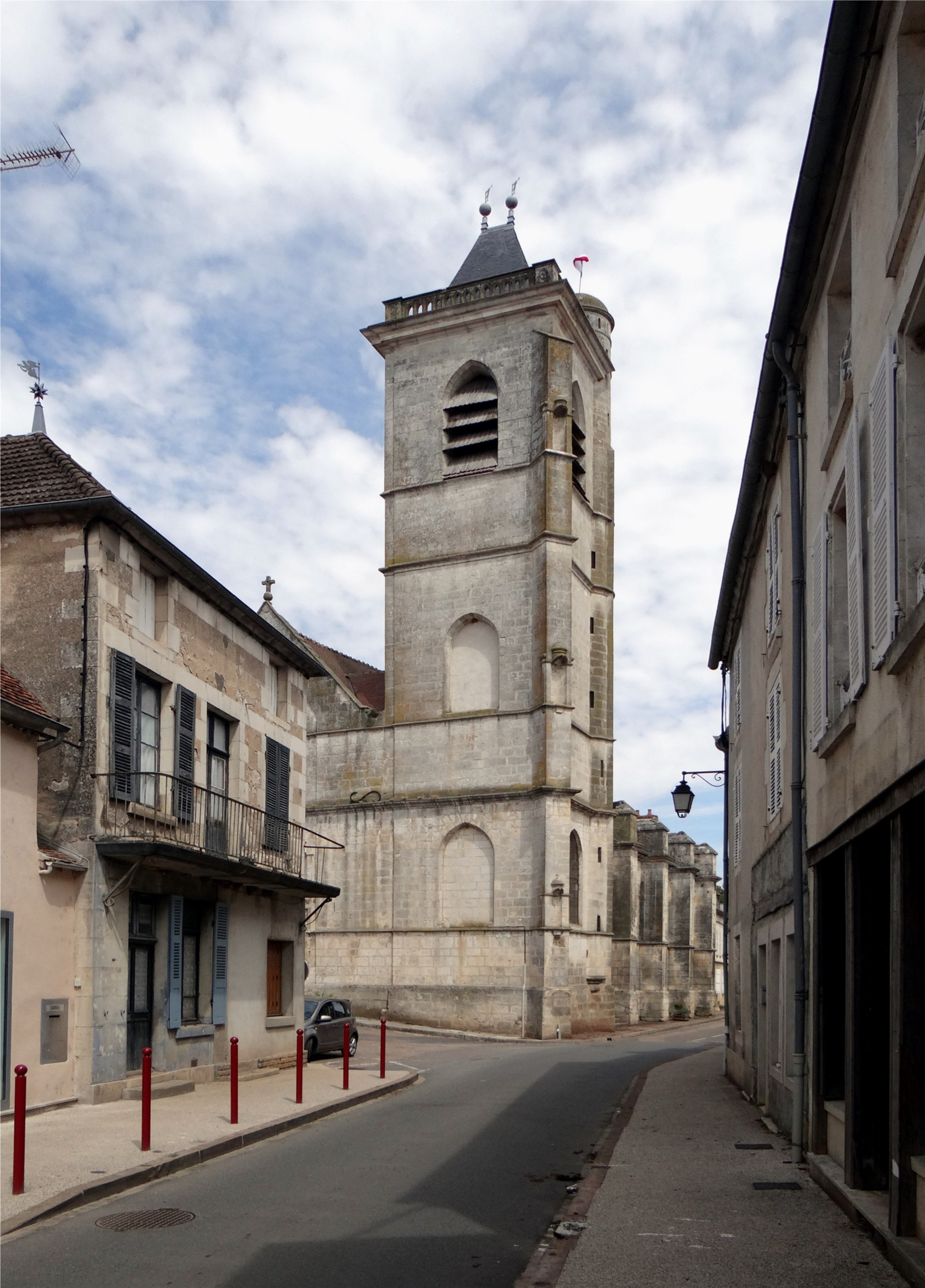 Eglise Notre-Dame, Coulanges-sur-Yonne, Yonne, France.